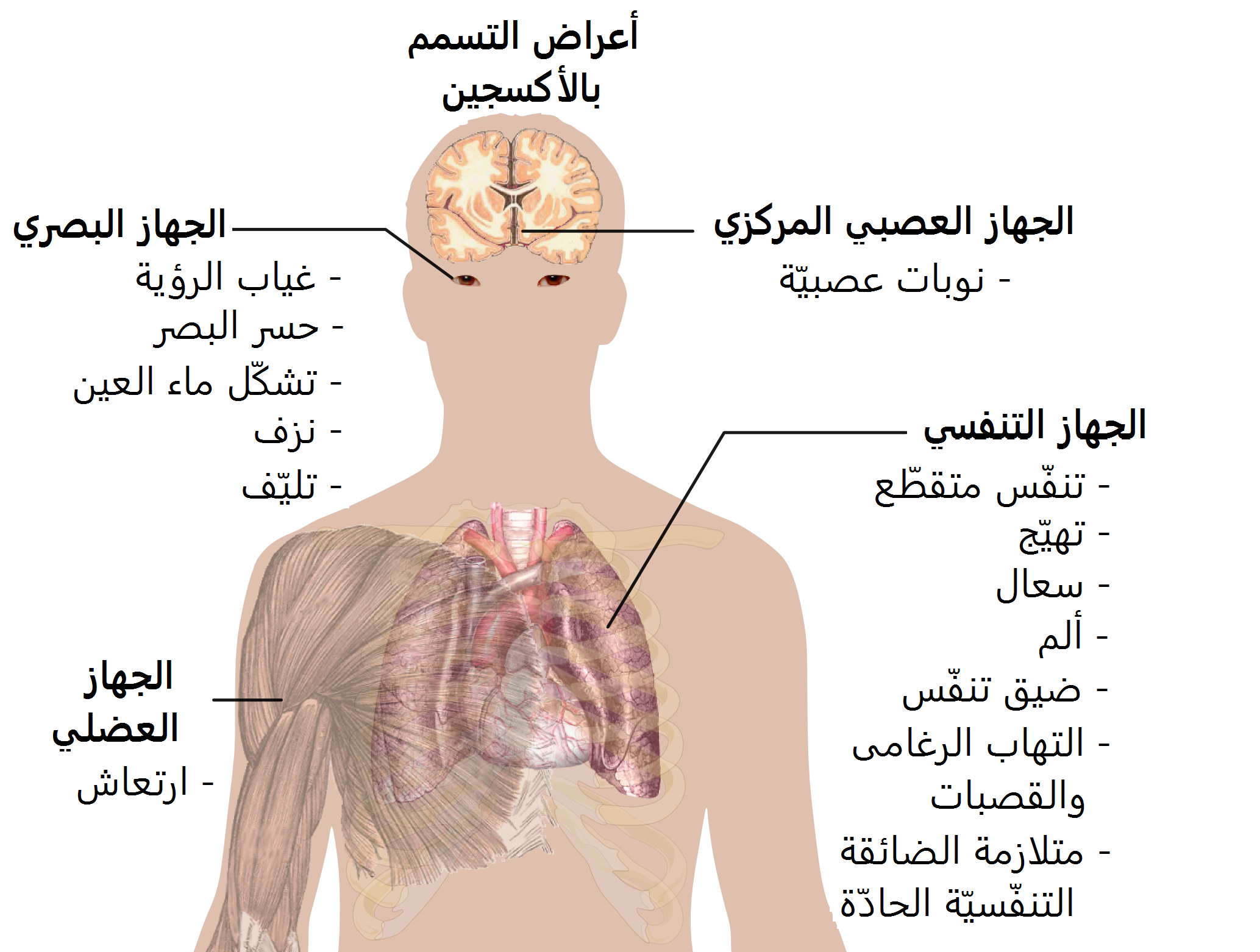 الأعراض الرئيسية للتسمم بالأكسجين